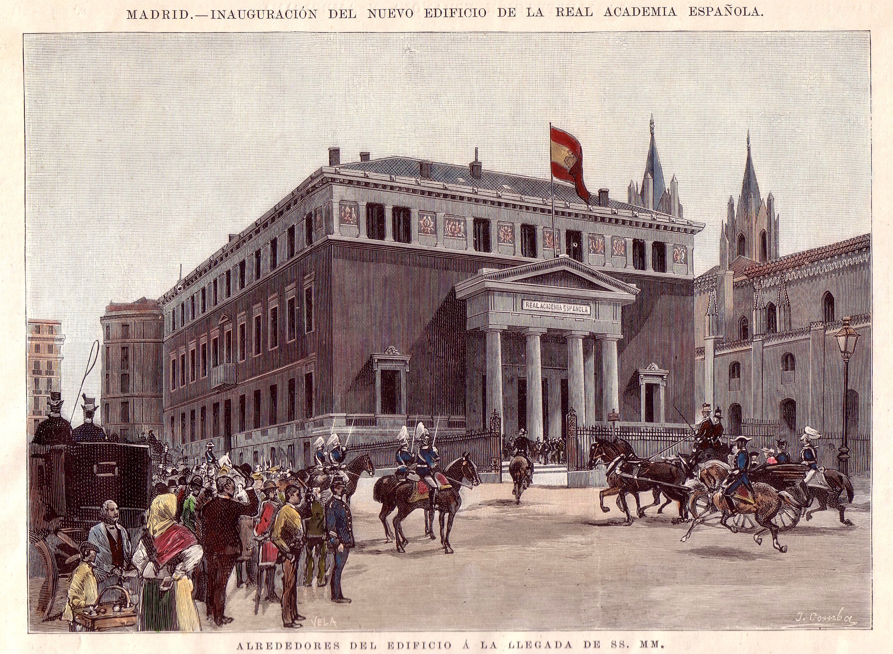 Madrid. — Inauguración del nuevo edificio de la Real Academia Española. Alrededores del edificio a la llegada de SS. MM., en la revista La Ilustración Española y Americana.